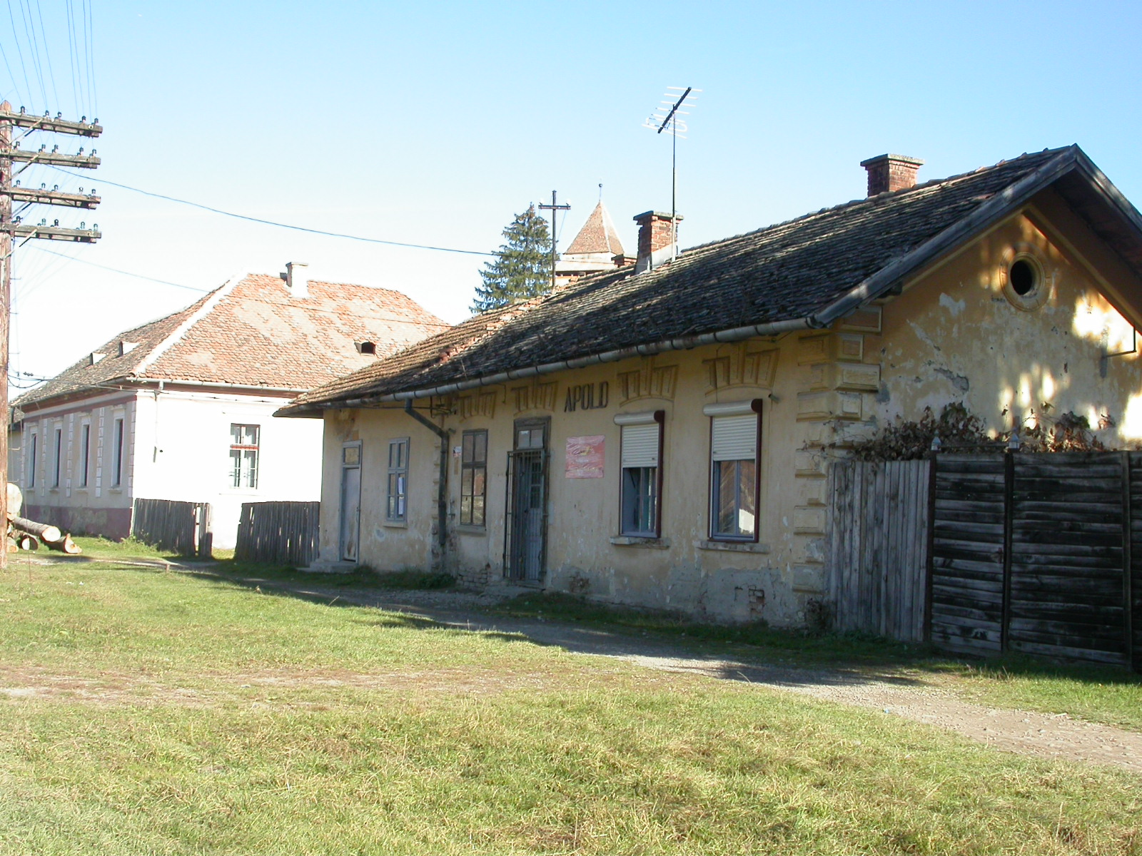 Gara C.F. -stație Apold, sf. sec. XIX 01